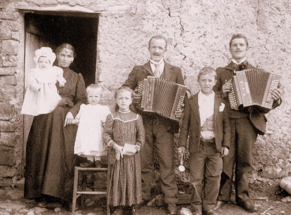 Fotografia del XIX secolo ritraente la famiglia Cereghino di Favale di Malvaro, Liguria, Italia